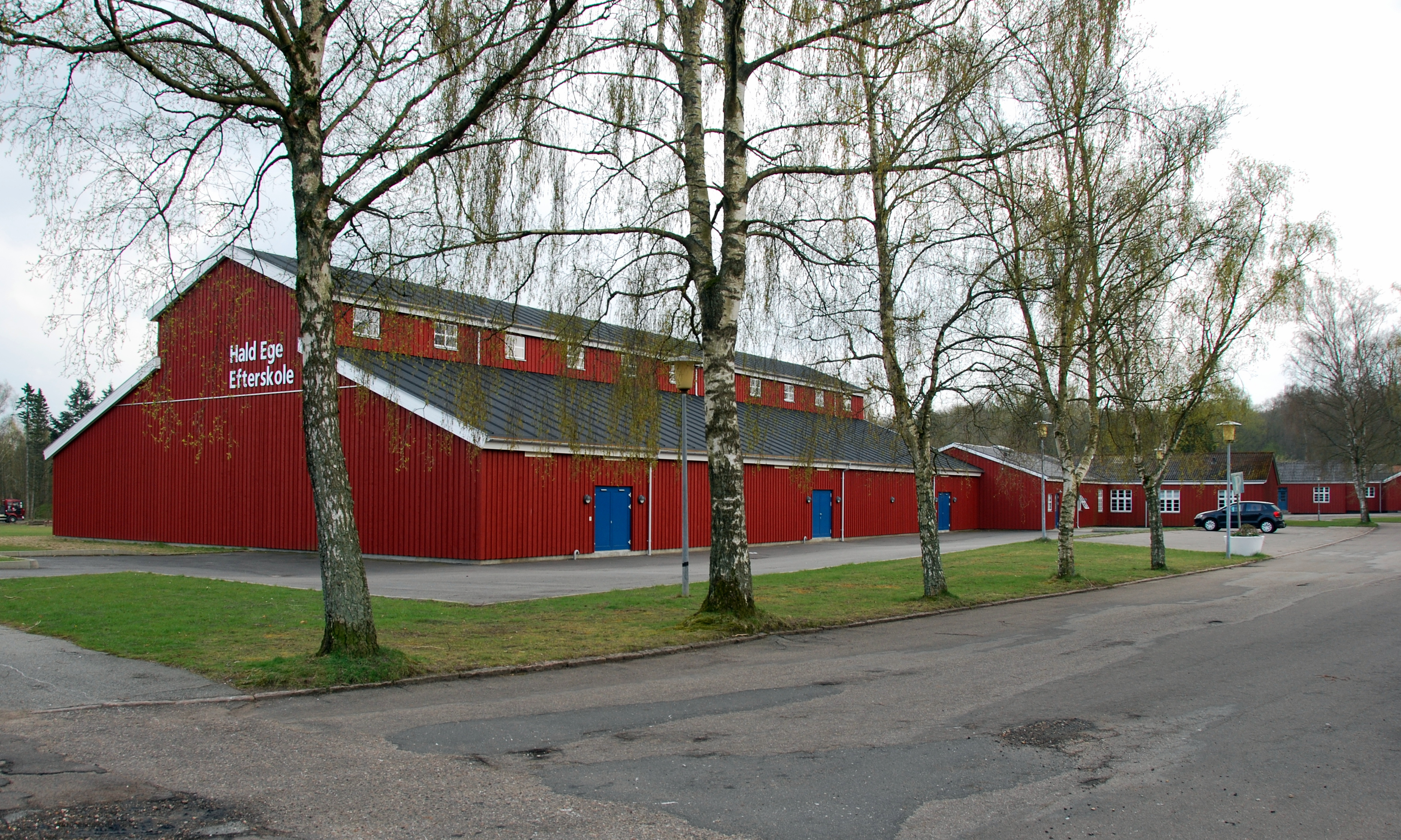 Idrætshallen på Hald Ege Efterskole, placeret ved den tidligere folkekuranstalt i Hald Ege ved Viborg.